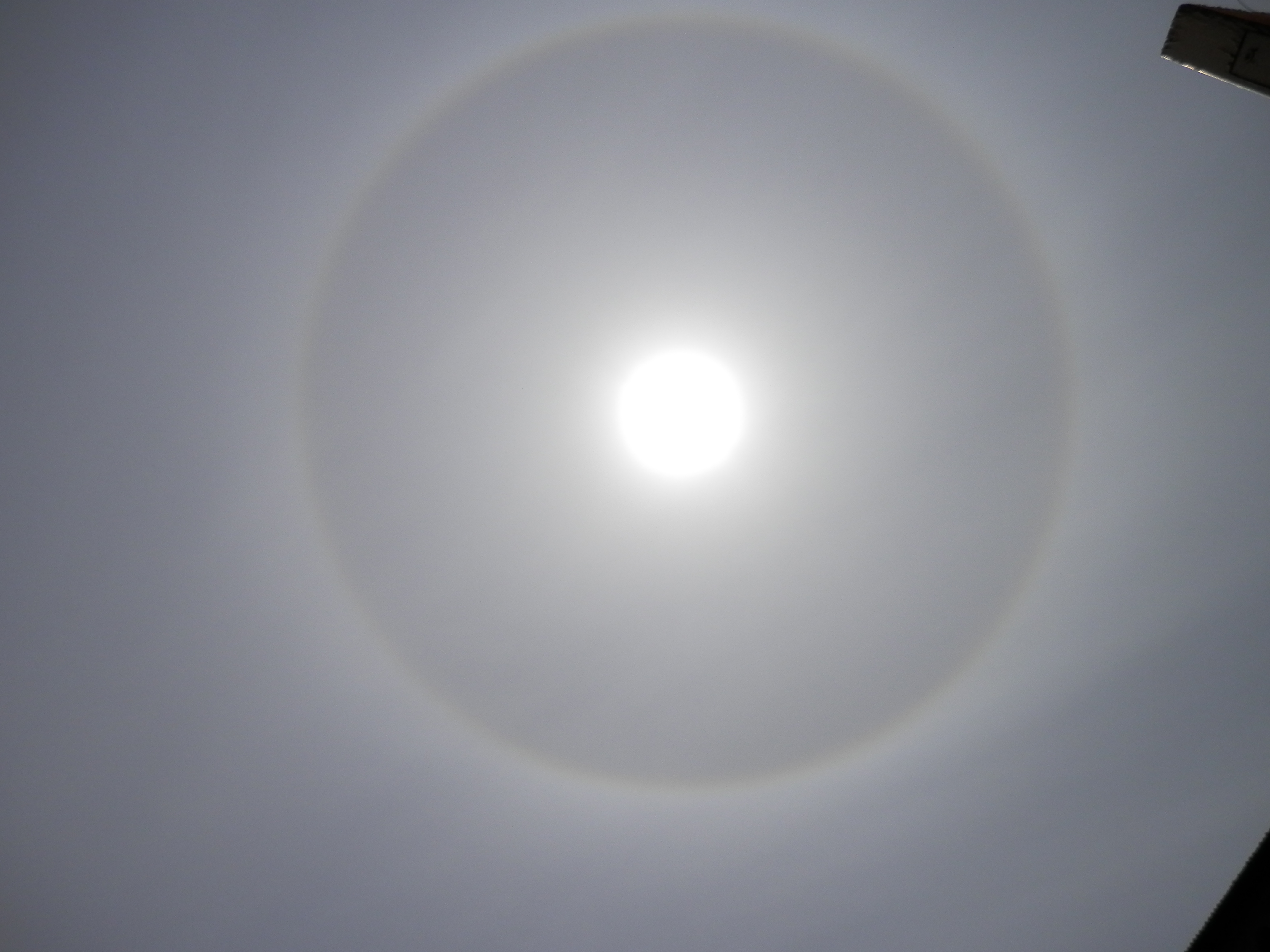 Scandiano (Italia) 2014-05-12 12:13:54